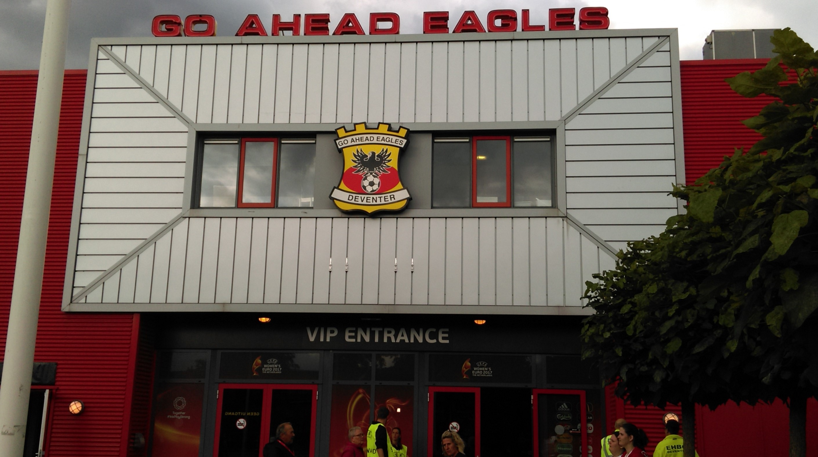 Stadion „De Adelaarshorst“ (Der Adlerhorst / Le nid d'aigle) in Deventer (Niederlande)